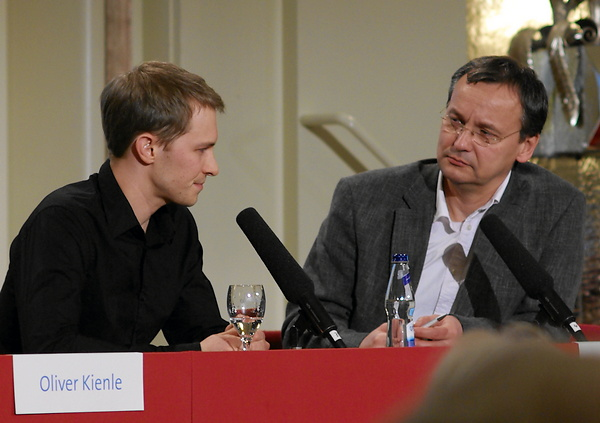 Regisseur Oliver Kienle (links) und Moderator Knut Elstermann bei der Vorstellung von Kienles Film Bis aufs Blut im Wettbewerb des MFG-Star Baden-Baden 2010.